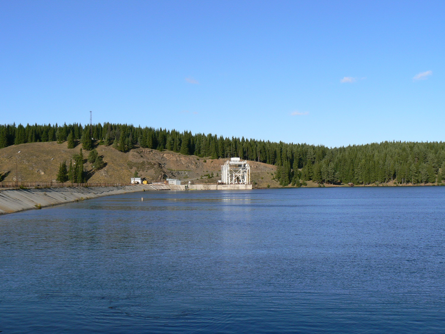 Нязепетровское Водохранилище на реке Уфа. Плотина и насосная станция принадлежат Водоканалу г.Екатеринбург.